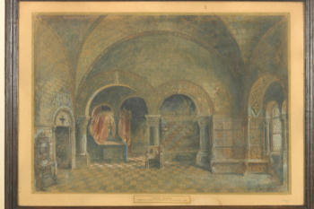 Lohengrin, Spannraft Ágoston díszletterve(1884)